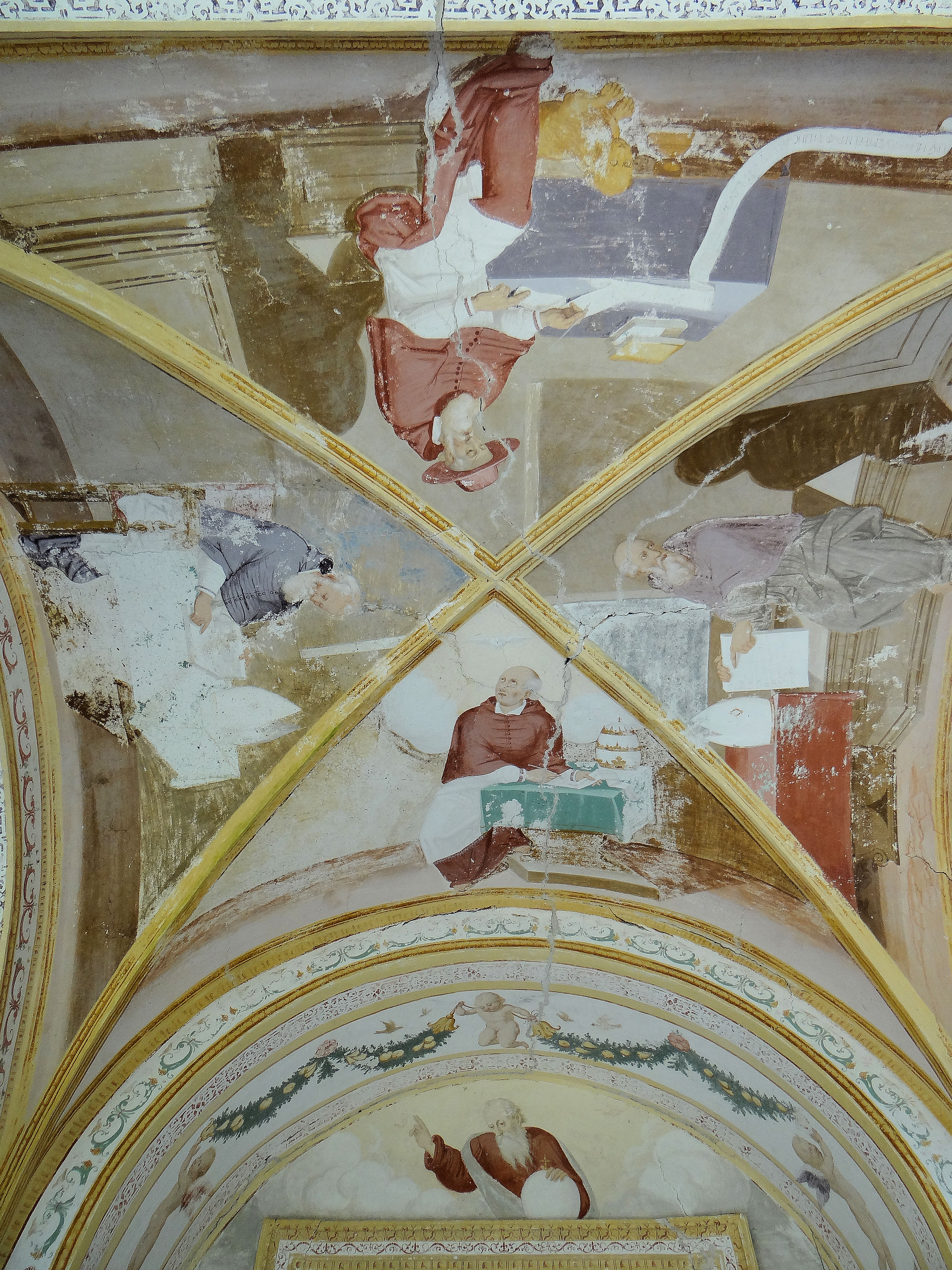 La Brigue - Chapelle Notre-Dame-des-Fontaines - Décor de la voûte du porche